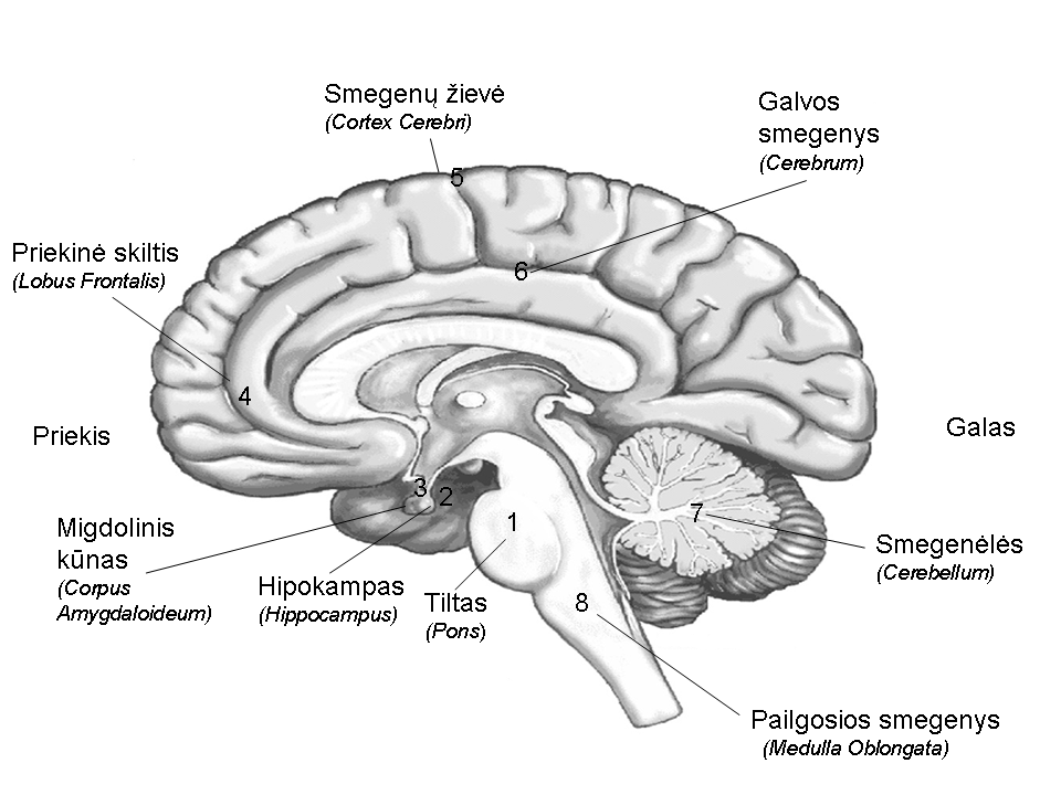 Smegenų dalys